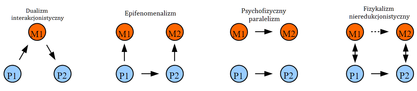 edytuj